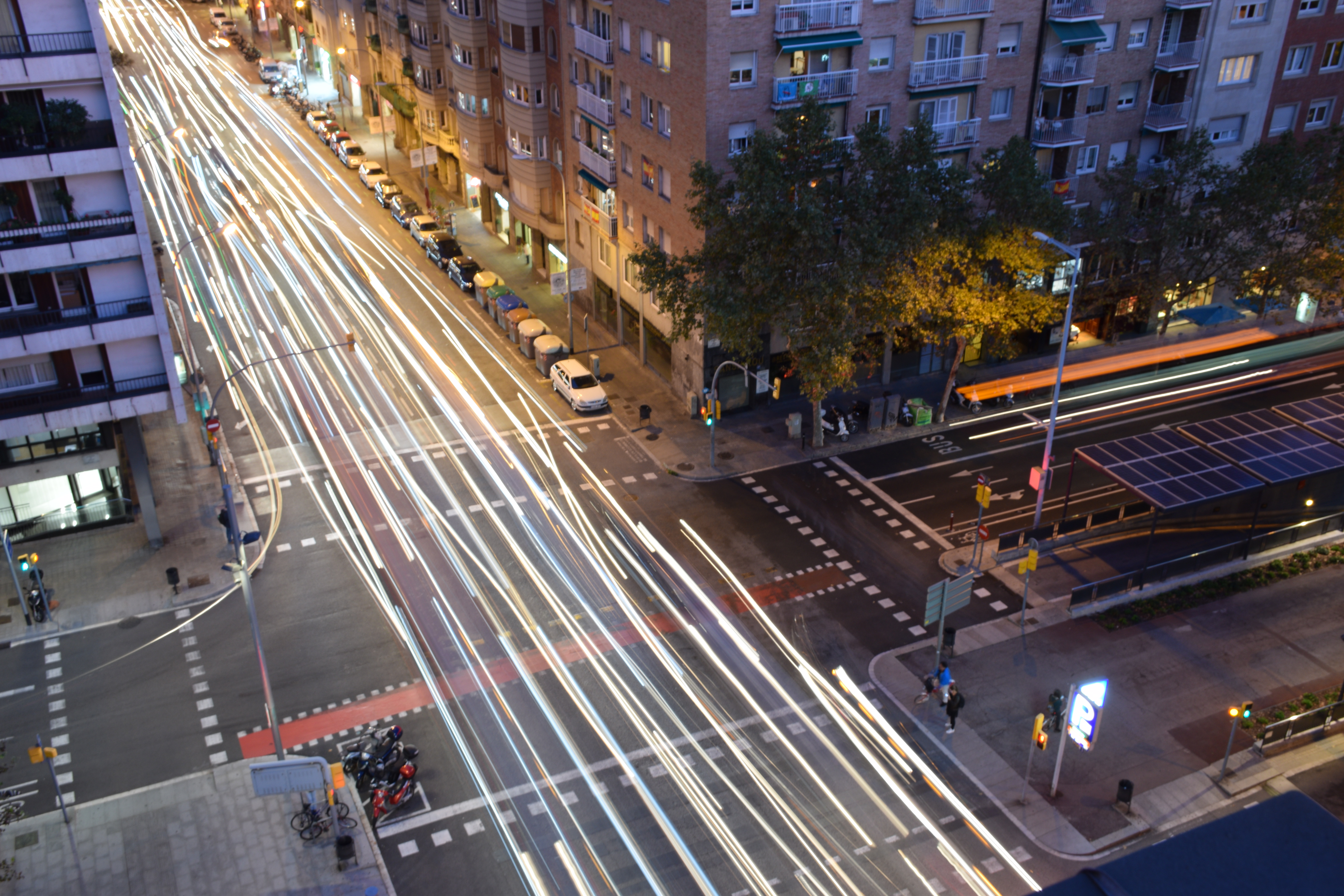 Photograhie faite avec un temps de pause de 5.00 s